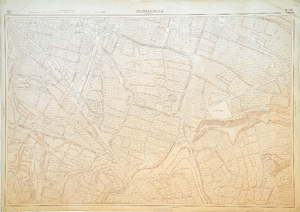 Tavola Schiavoni n.33, "Marianella", opera di Federico Schiavoni. A volte nota come "Tavola Giambarba" dal nome di Adolfo Giambarba, l'ingegnere che su di essa progettò l'intervento del Risanamento di Napoli e il piano regolatore e di ampliamento dei rioni Vomero e Arenella, visualizzati sulle mappe con diversi colori.